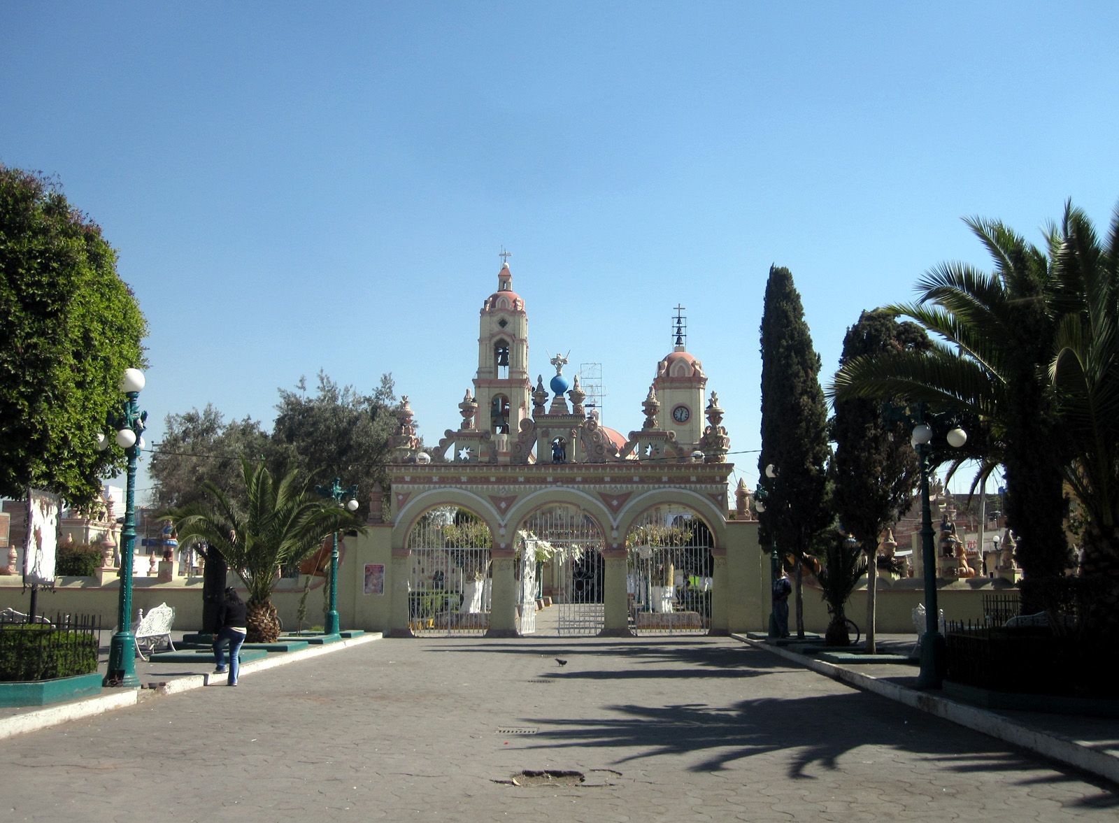 Kirken i sentrum av Chiconcuac i Mexico